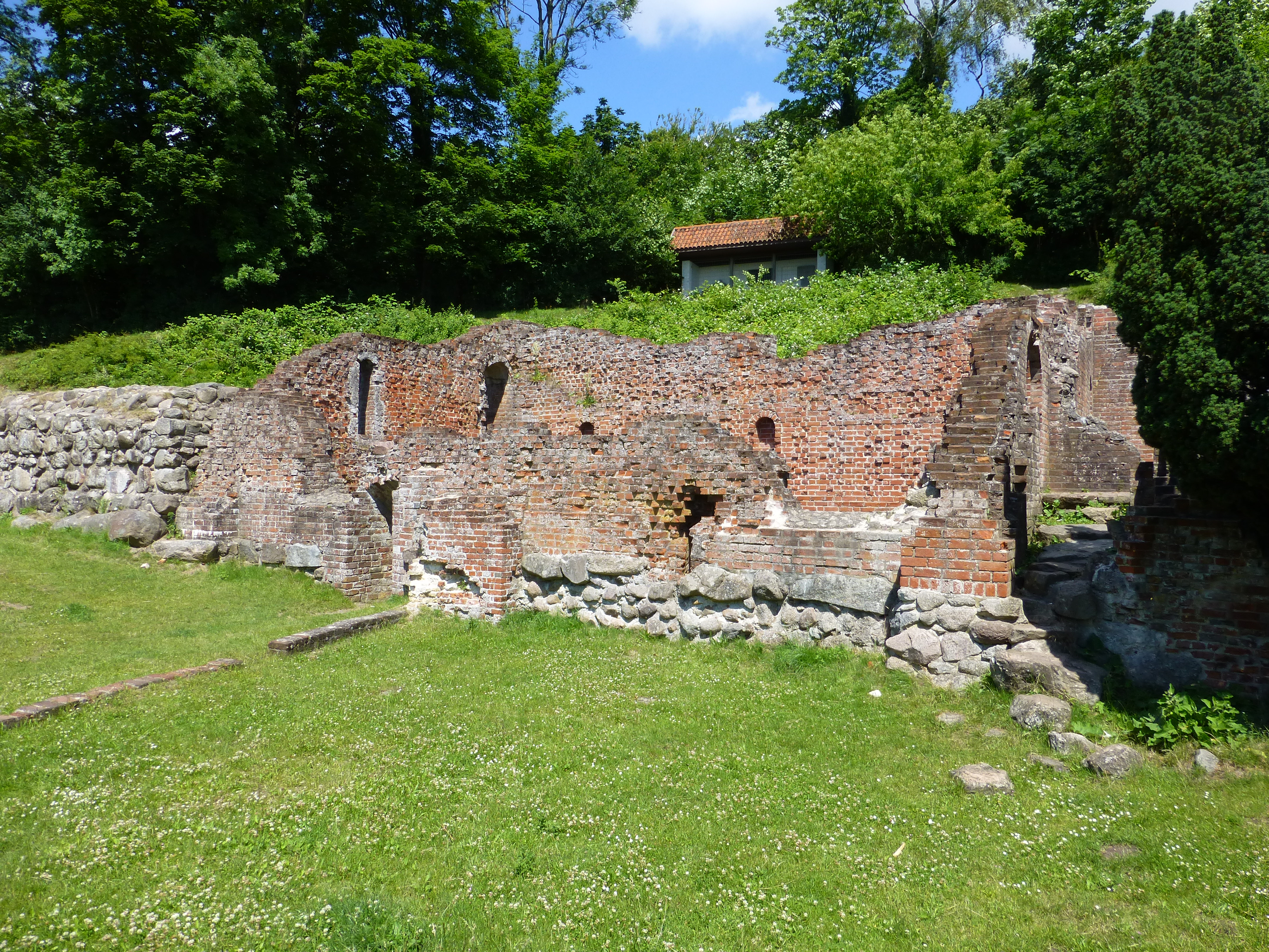 Ruinerne 2012